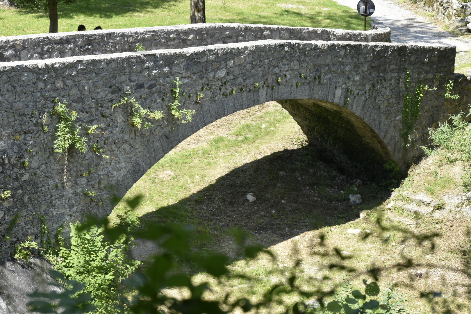 Uno dei due archi.